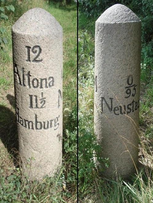 Meilenstein 12 der Altona-Neustaedter Chausee